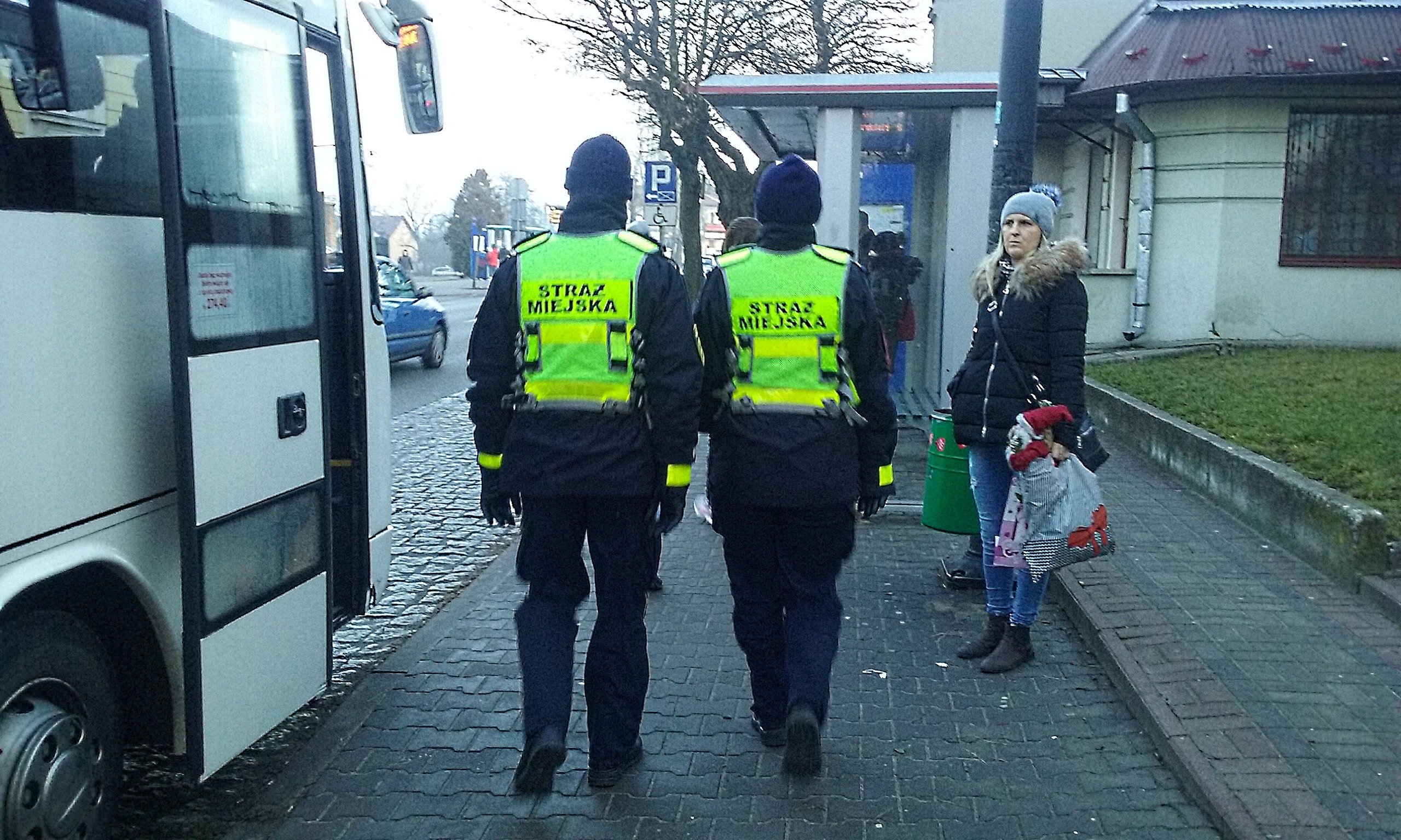 Zimowe umundurowanie patrolu męsko-kobiecego Straży Miejskiej w Tomaszowie Mazowieckim